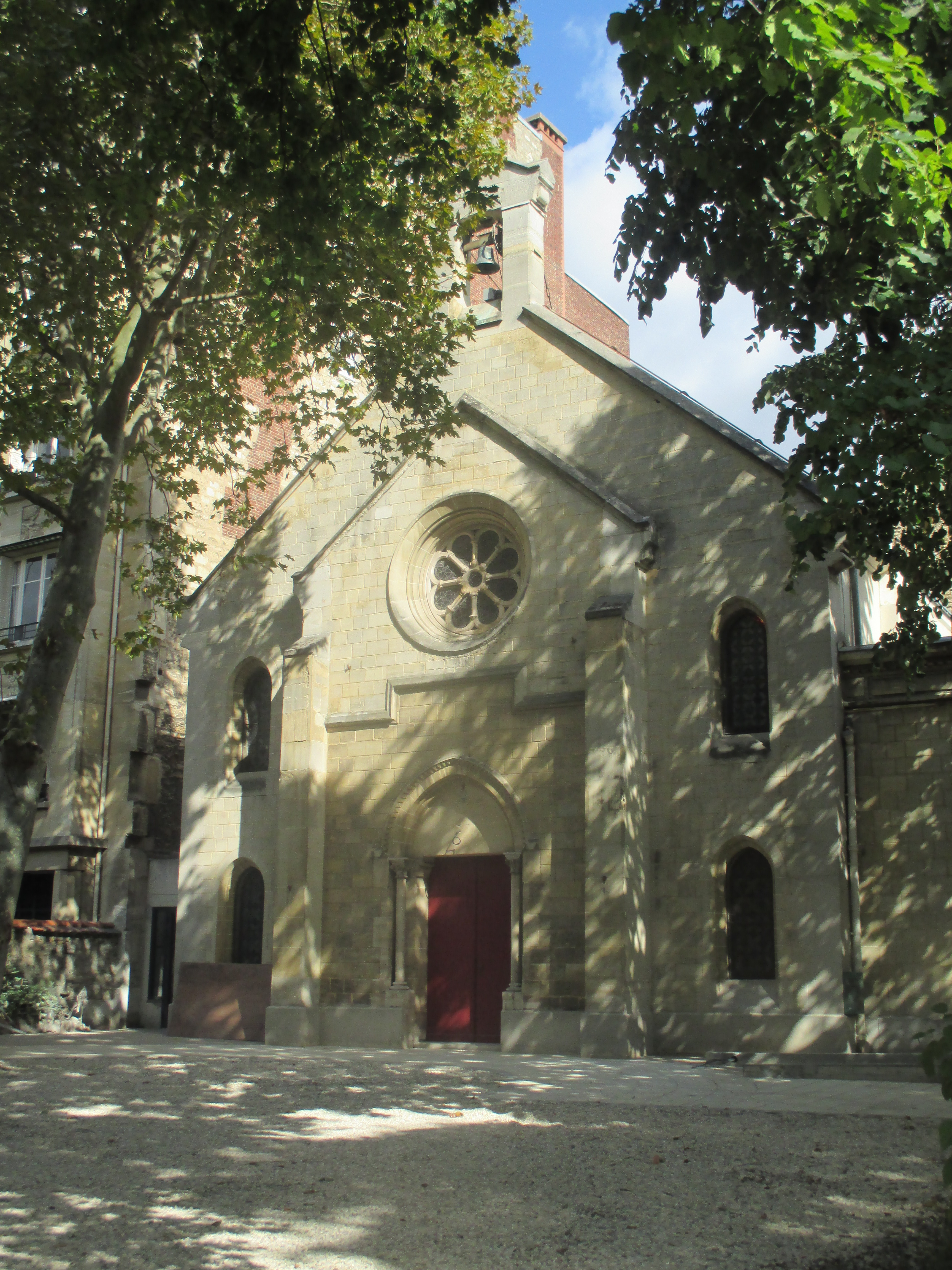 Vue du temple protestant de Neuilly, boulevard Inkermann.